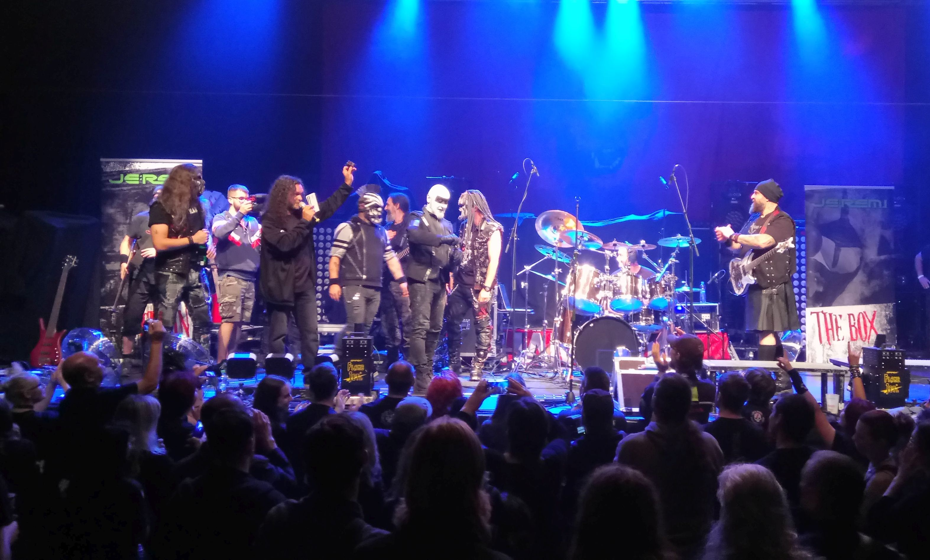 Jerem.I křtí v Brně desku Jack In The Box. Kmotry jsou kapely Dymytry a Hämatom.